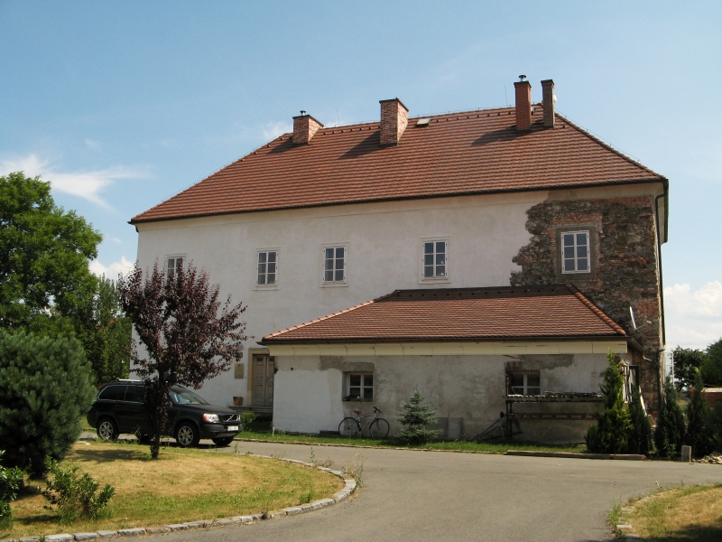 Letohrádek - zámeček tzv. Jägerhaus (Ráby), Ráby 22, Ráby.